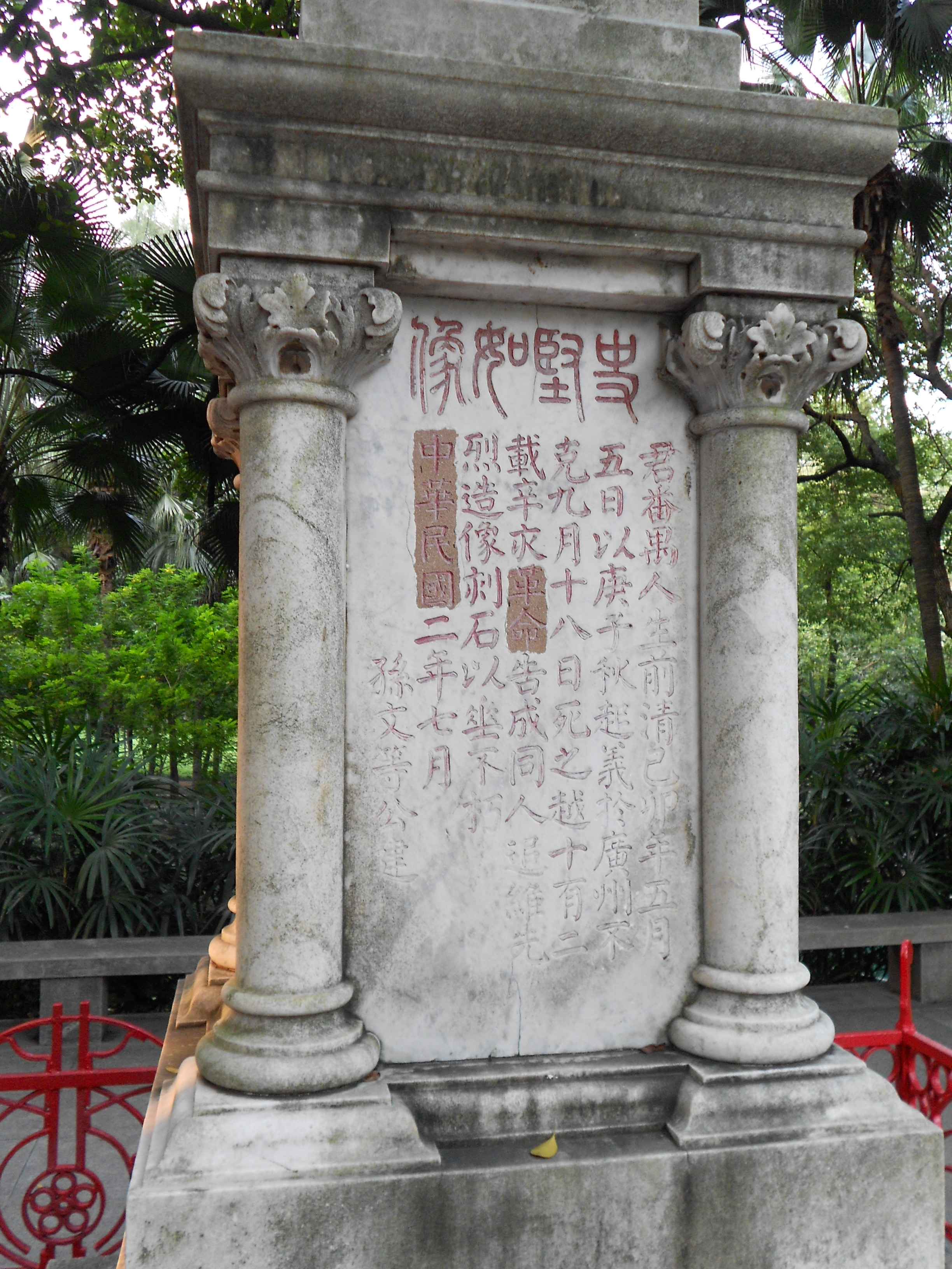 中華民國革命家史堅如墓雕像基座上的「中華民國」及「革命」在文化大革命期間被鏟去，多年後才被修補。